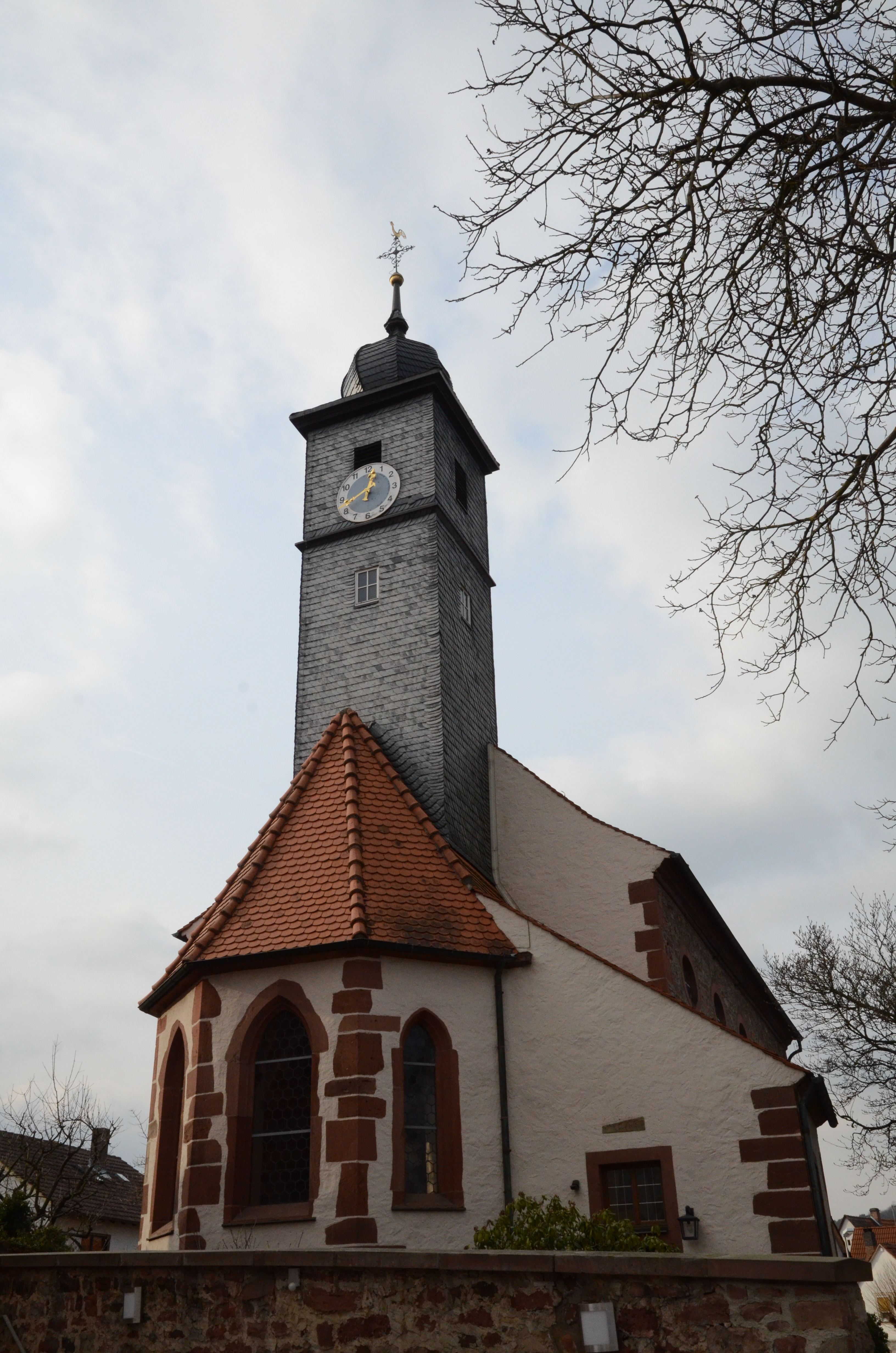 Dorfkirche in Eschau